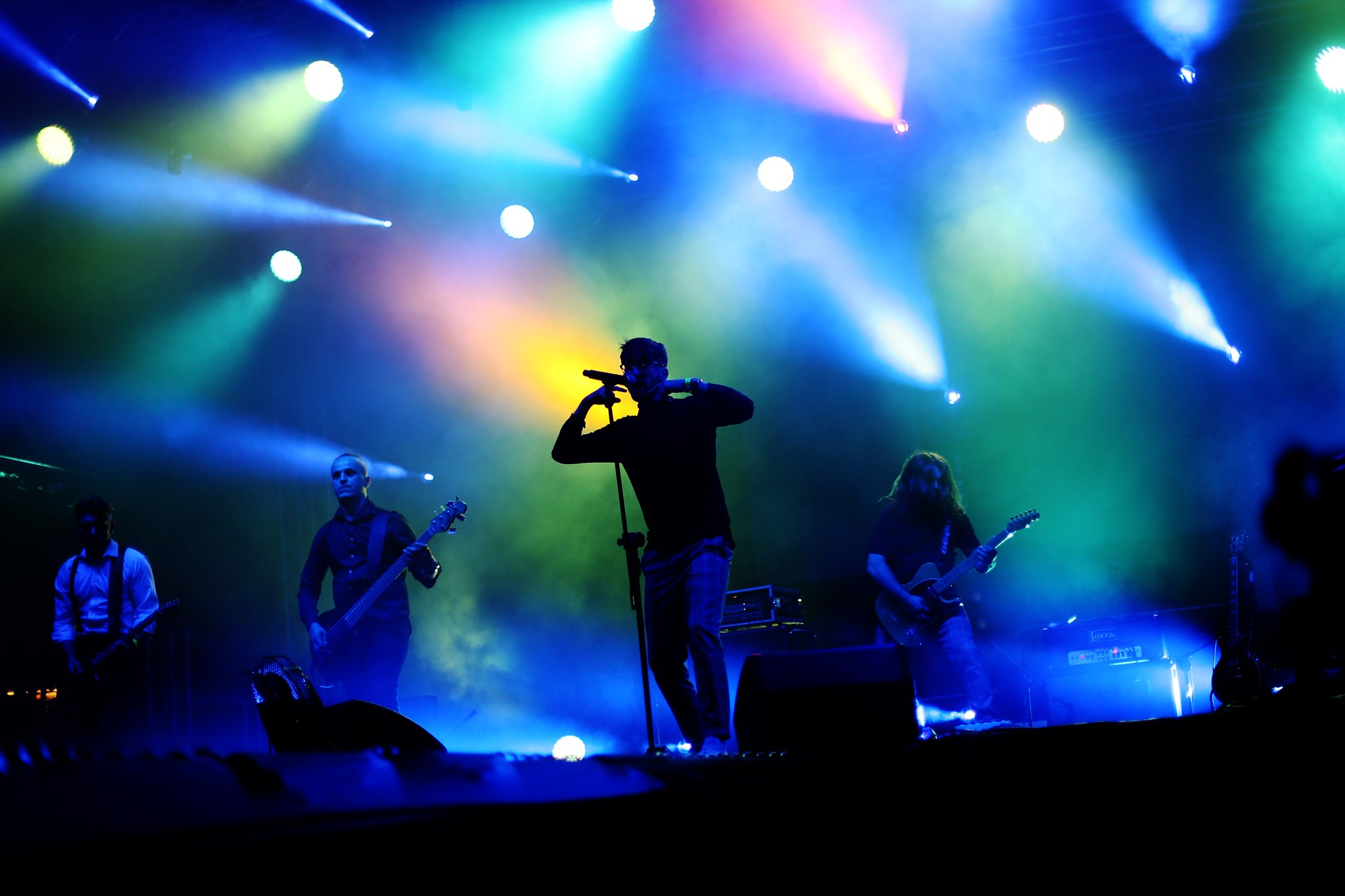 Eleanor Gray na poznańskiej scenie juwenaliowej. 2019 r. Skład: Alan Garstecki, Daniel Maliszewski, Jacek Idźkowski, Jarek Majer, Szymon Gaertig.